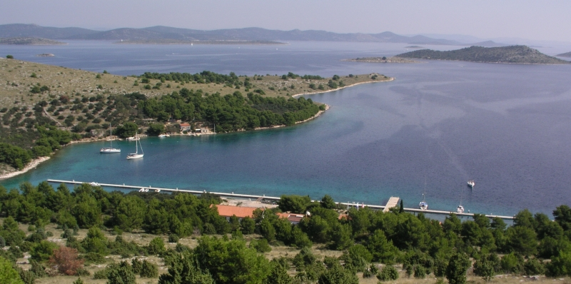 Marina Žut, Kornati, Croatia